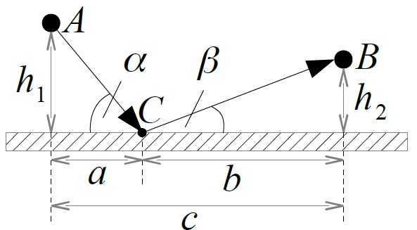 Valguskiire peegeldumine